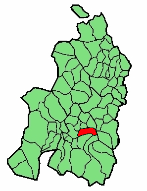 Duzunaritze-Sarasketa udalerriaren kokapena Nafarroa Beherean